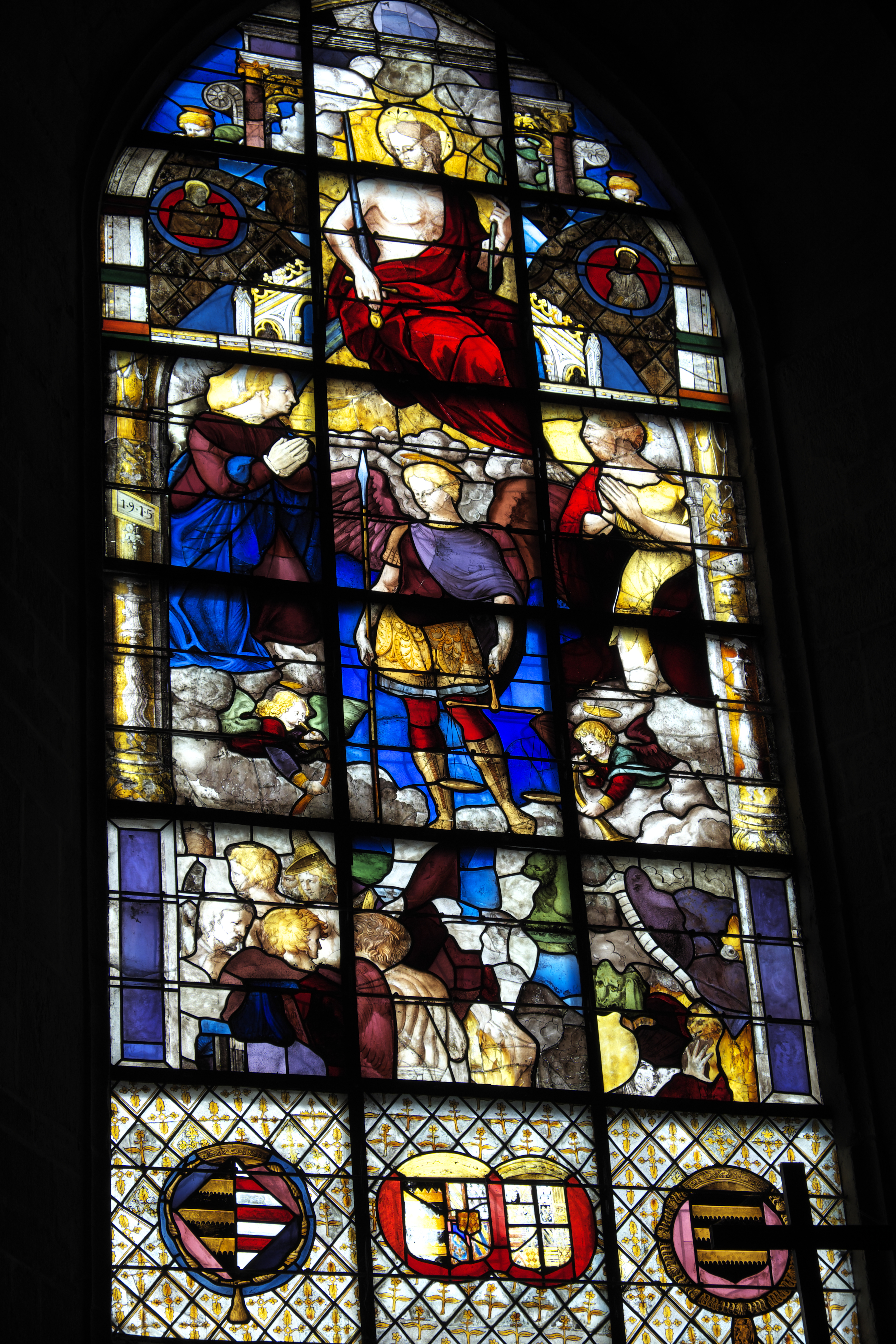 Basilika Notre-Dame-de-l'Assomption in La Guerche-de-Bretagne im Département Ille-et-Vilaine (Bretagne/Frankreich), Bleiglasfenster (Baie 12) mit der Jahreszahl 1537, restauriert 1915; Darstellung: Jüngstes Gericht; Christus als Weltenrichter mit Schwert und Lilie, Erzengel Michael mit Seelenwaage